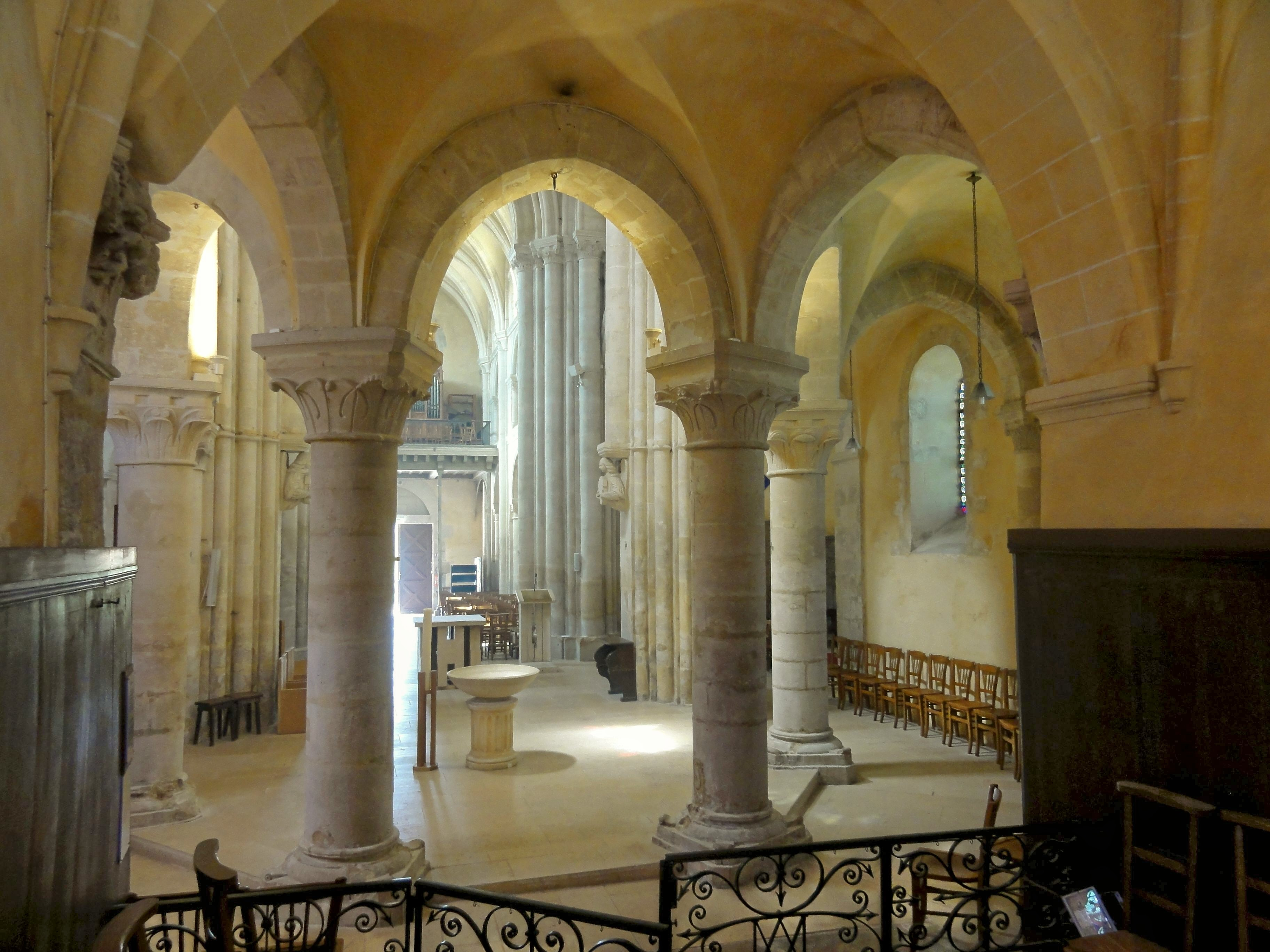 Déambulatoire.